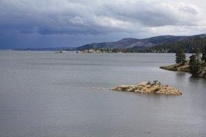 Canyon Ferry Reservoir near Helena, Montana 2009